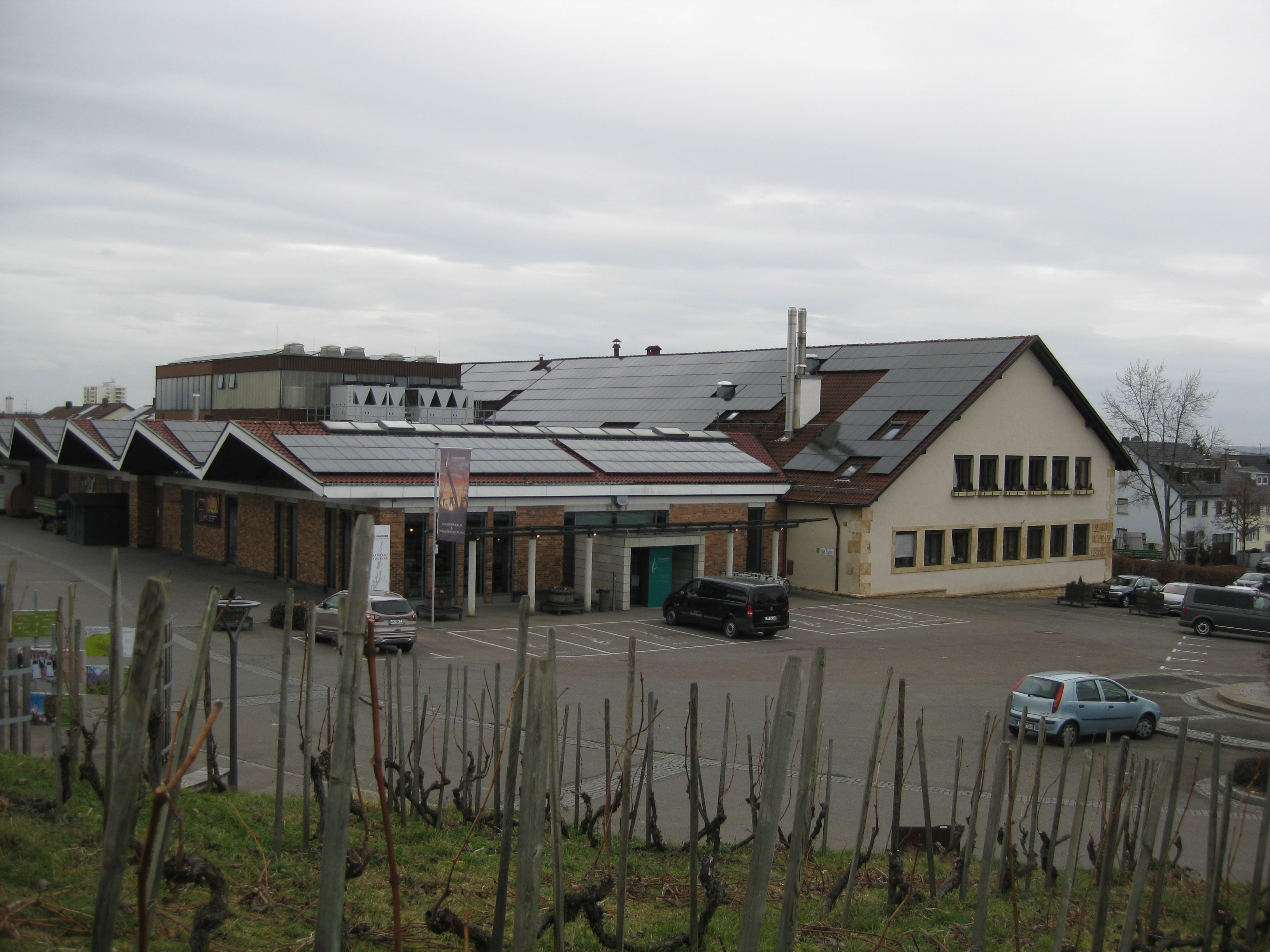 Wiechernschule in Fellbach